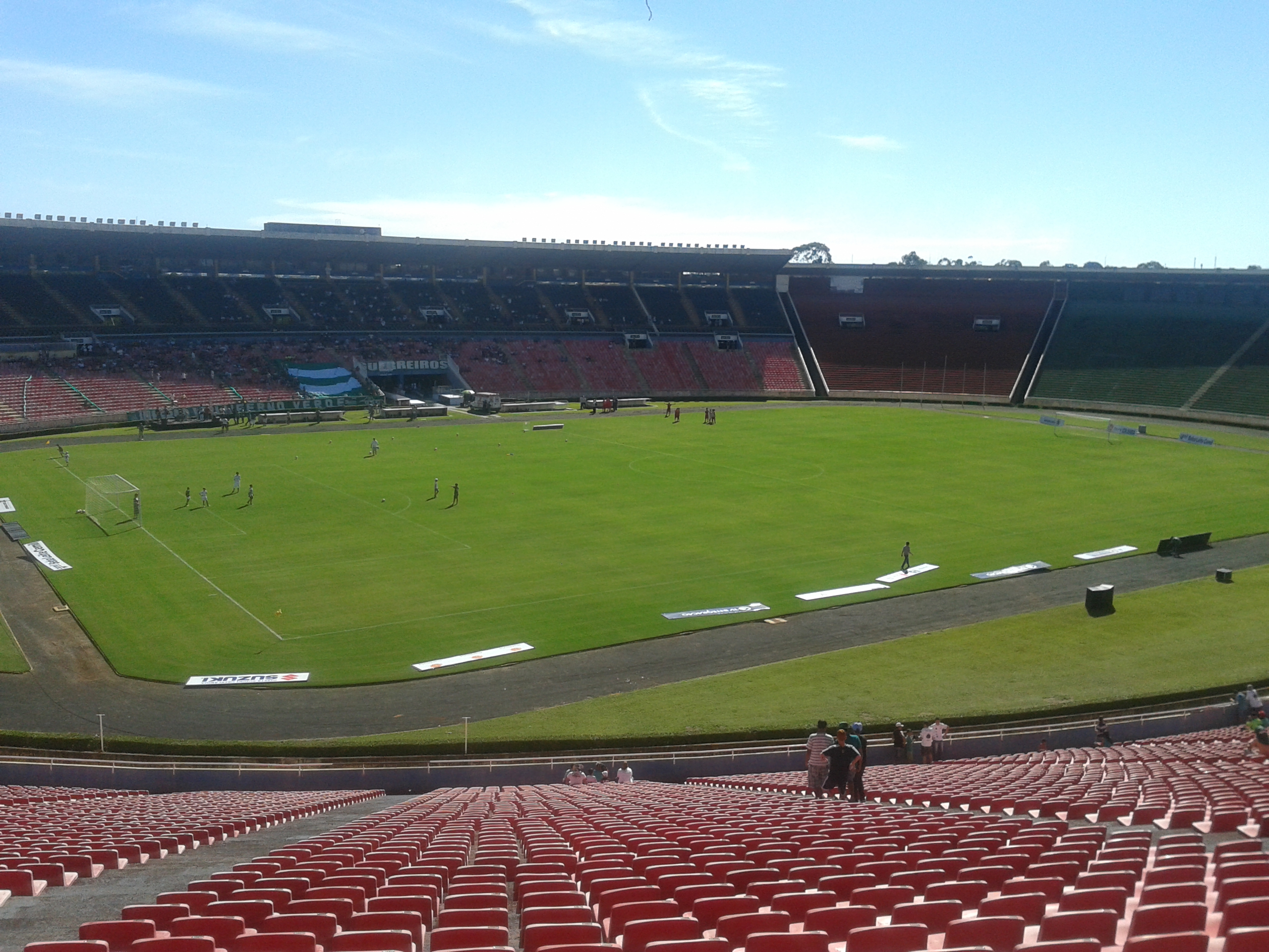 Imagem interna do Estádio Municipal Parque do Sabiá. Fotografia feita antes da partida entre Uberlândia e América de Teófilo Ottoni pela última rodada do Módulo II de 2015.